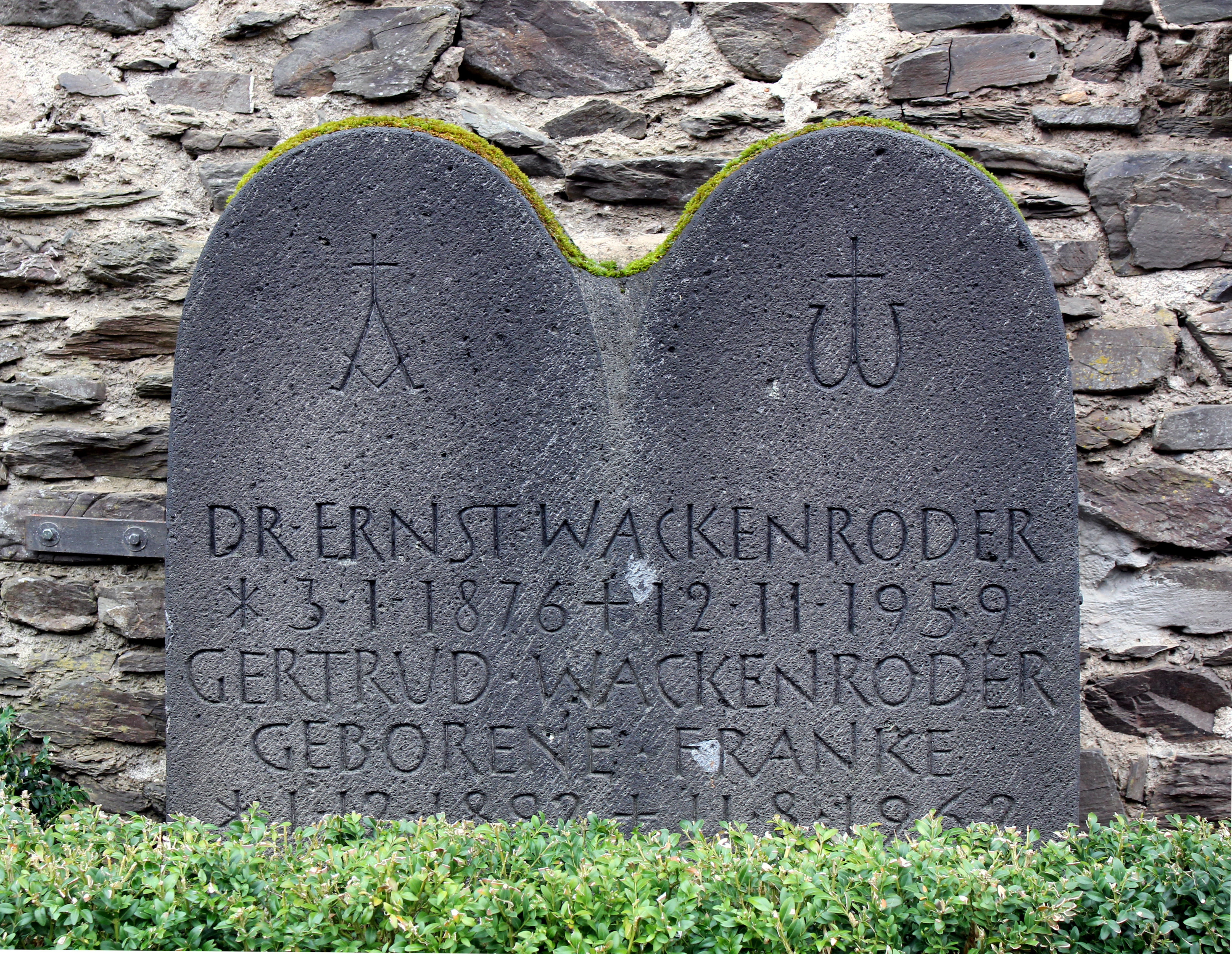 Treis-Karden; Grabstein der Eheleute Wackenroder am alten Kirchturm auf dem Friedhof von Karden. Ernst Wackenroder hat sich insbesondere um die Geschichtsschreibung von Karden verdient gemacht.